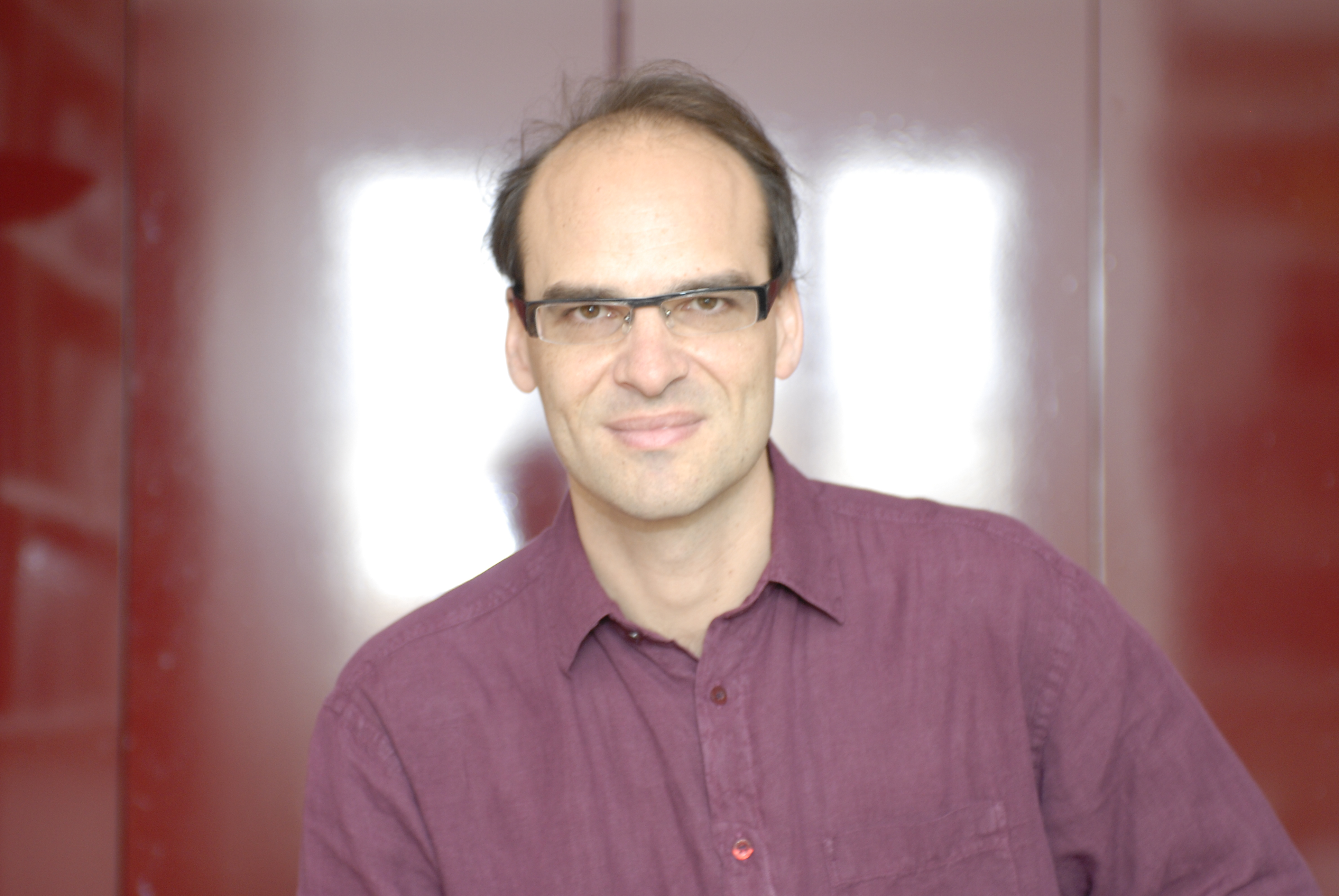 Eric Macé, french sociologist